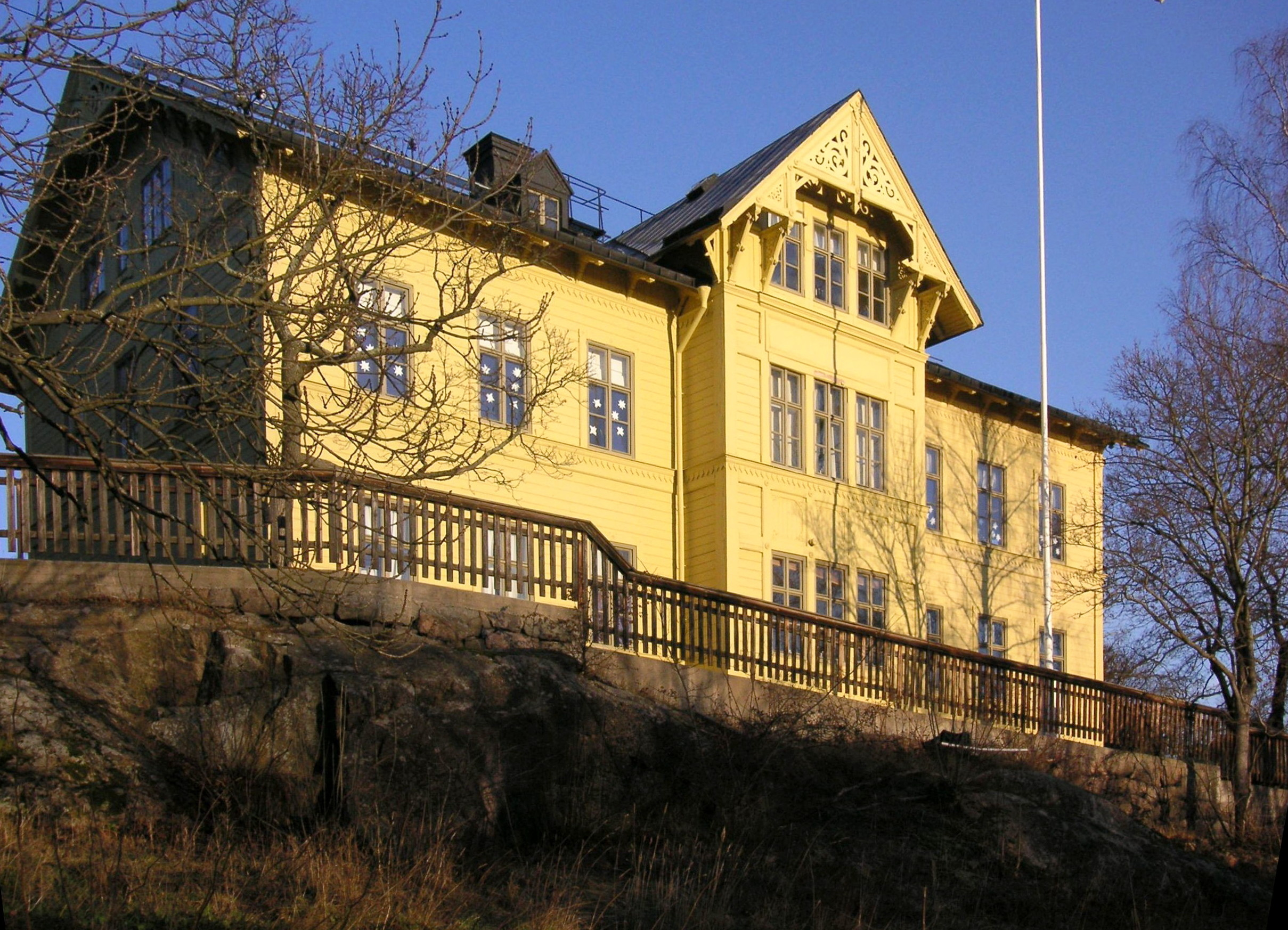 Djurgårdsskolan